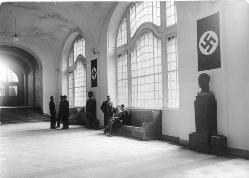 Erstmalig gestattete Aufnahmen aus dem Geheimen Staatspolizeiamt in Berlin! Die Büste des Führers und Reichskanzlers Adolf Hitler und des preuß. Ministerpräsidenten Hermann Göring in der Haupthalle des Geheimen Staatspolizeiamtes in Berlin. 1934